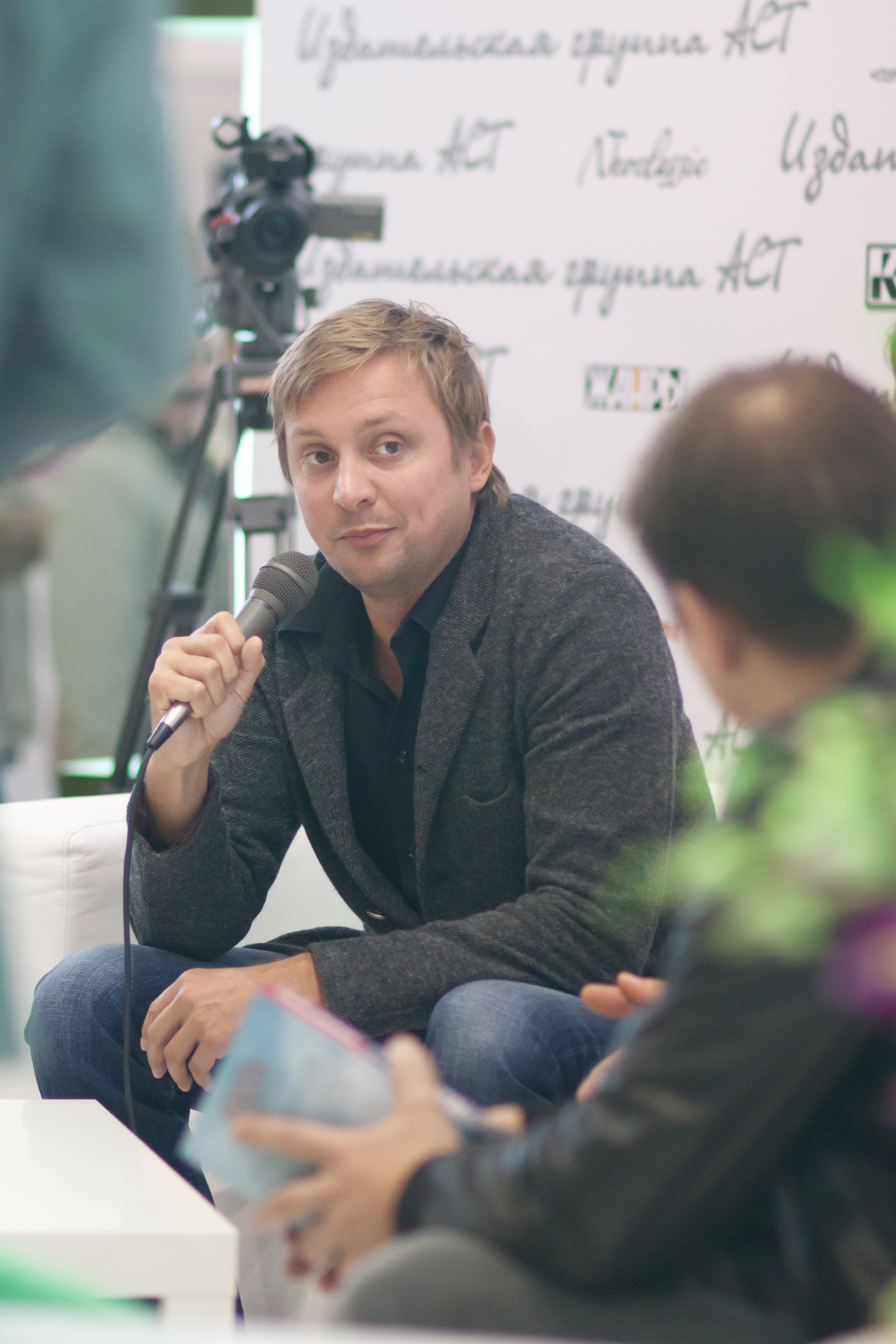 Актёр Артём Михалков на ММКВЯ-2012